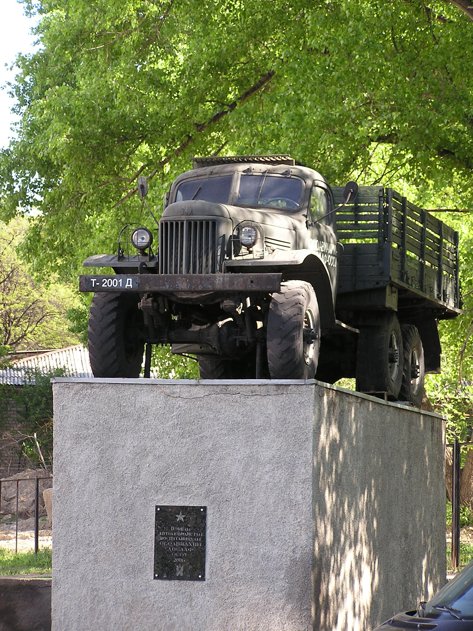 Памятник воинам-автомобилистам - воспитанникам ОСОАВИАХИМ-ДОСААФ-ОСОУ